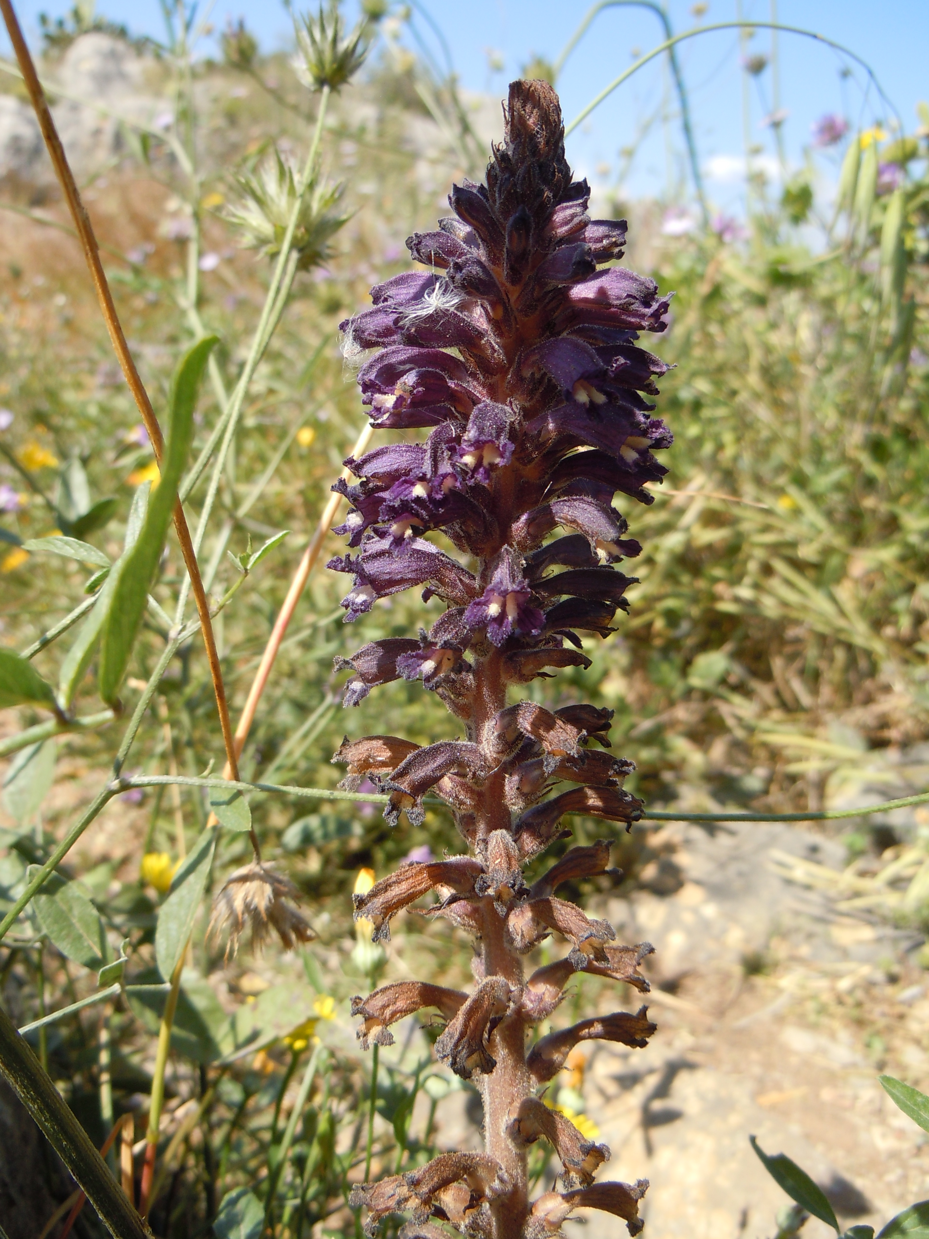 Orobanche lavandulacea - Palamidi- Grèce Orobanche lavandulacea en Grèce